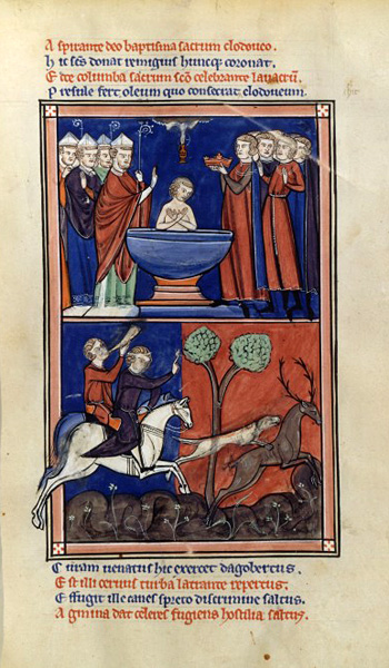 Baptism of Clovis from "La vie de Denis de Paris"